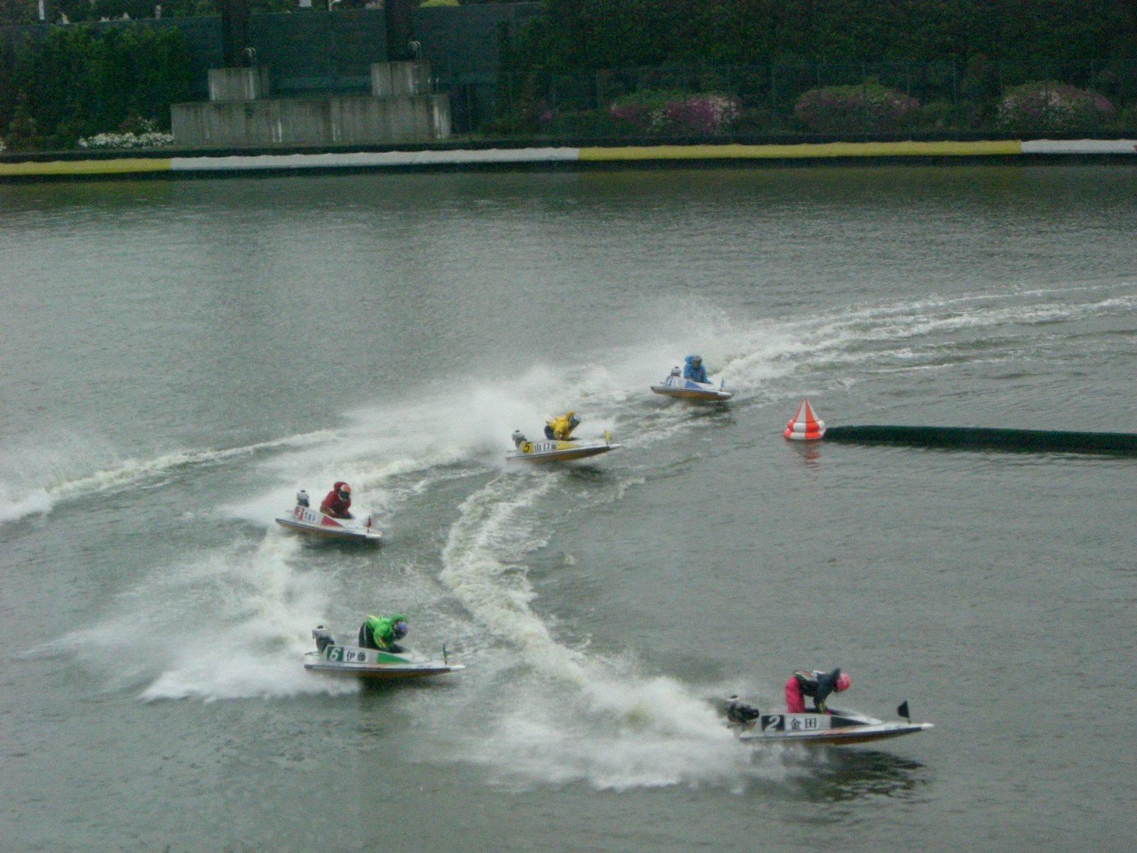 KYOTEI at Suminoe OSAKA